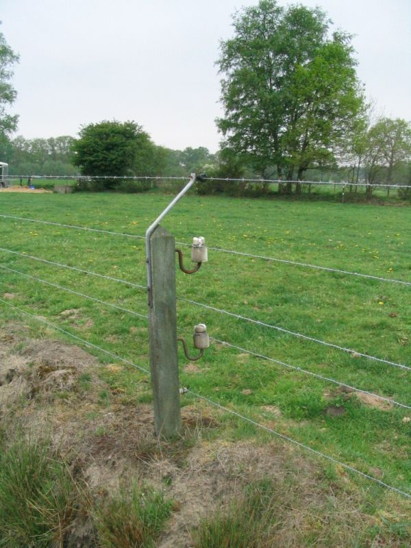 Een degelijke vorm van schrikdraad